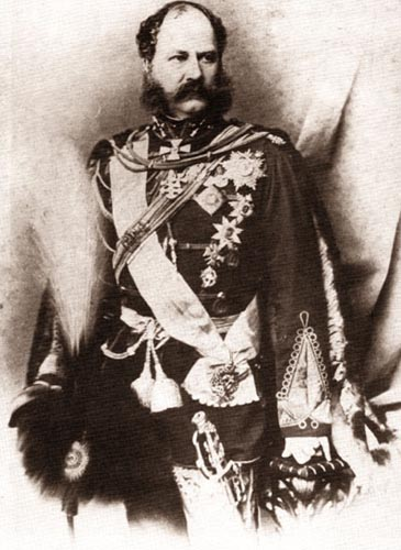 Veldmaarschalk Baryatinskiy